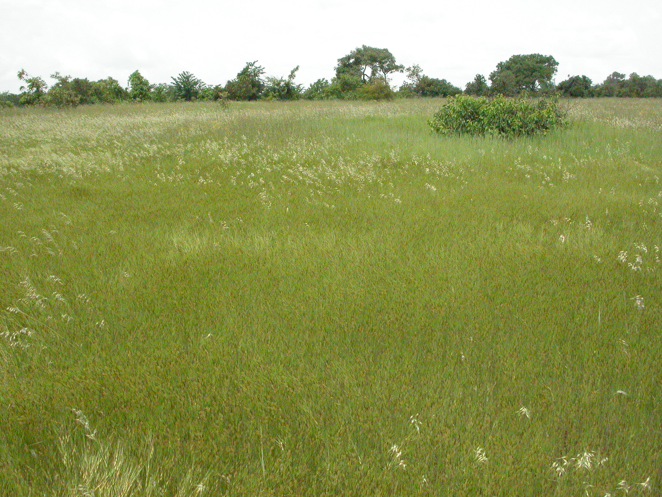 Bowal (grass savanna on duricrust) in F Cl de Dindéresso, Burkina Faso